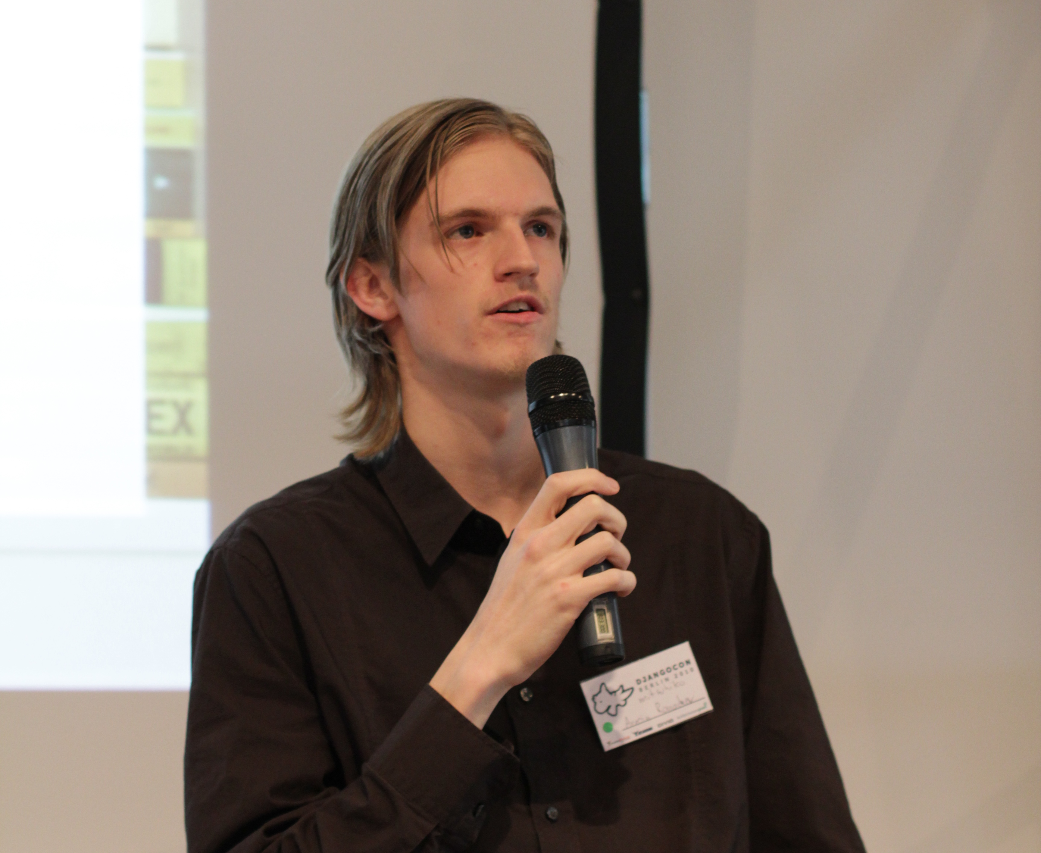 На DjangoCon Berlin 2010